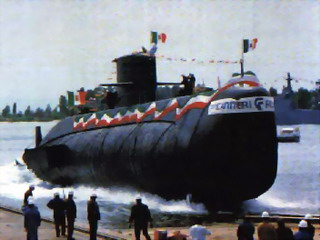 Il varo del sommergibile Longobardo a Monfalcone